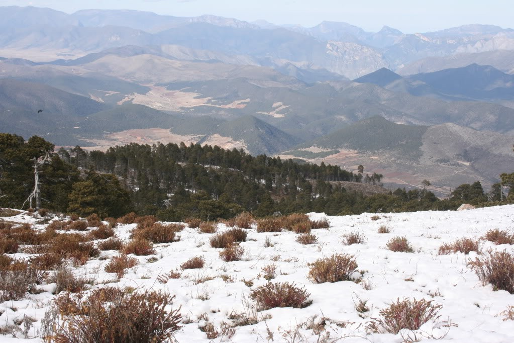 En la cima del cerro del Potosí, se aprecian hermosos paisajes alpinos